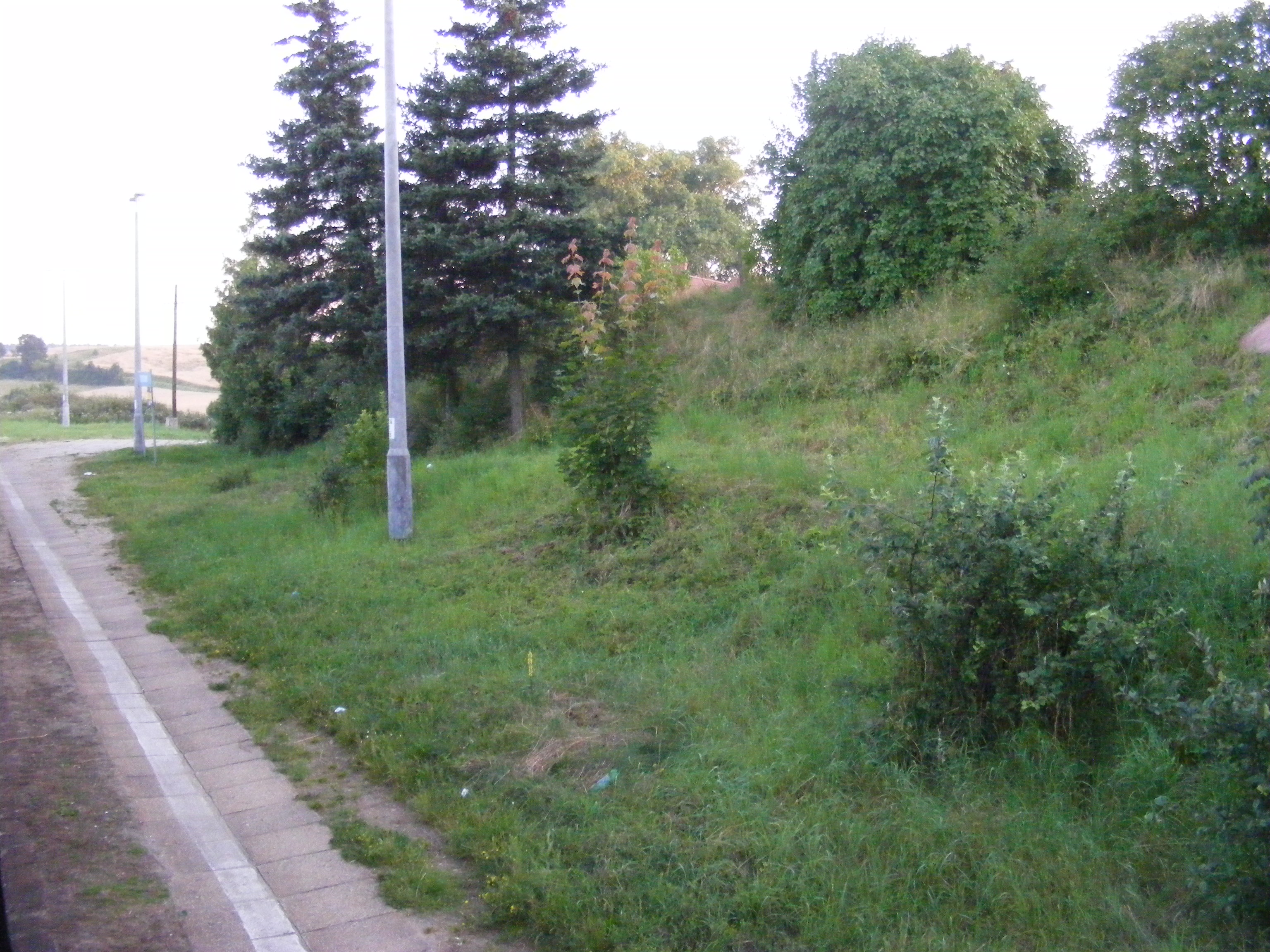 Przystanek kolejowy Borkowo (woj. pomorskie)